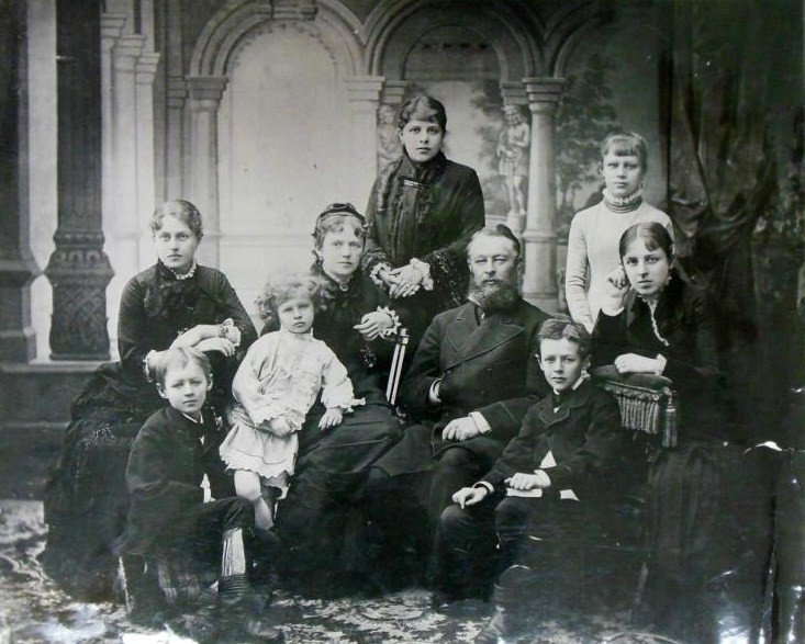 Семья Давыдовых (сидит слева в ближнем ряду - Владимир Львович), 1881